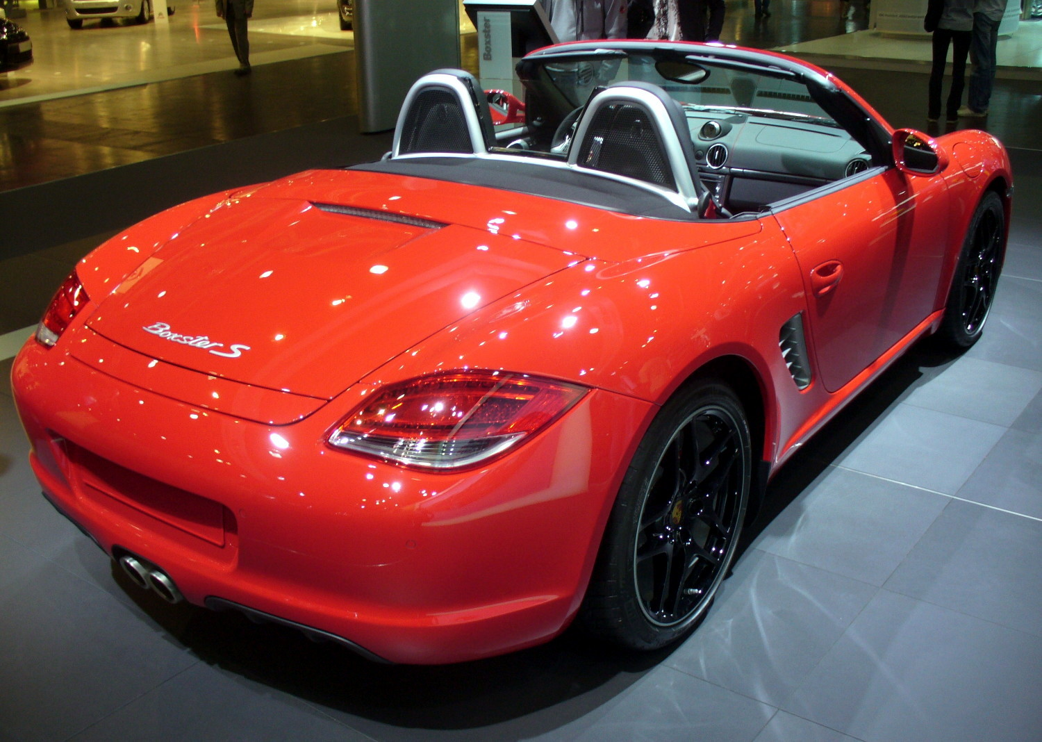 Porsche 987 Facelift